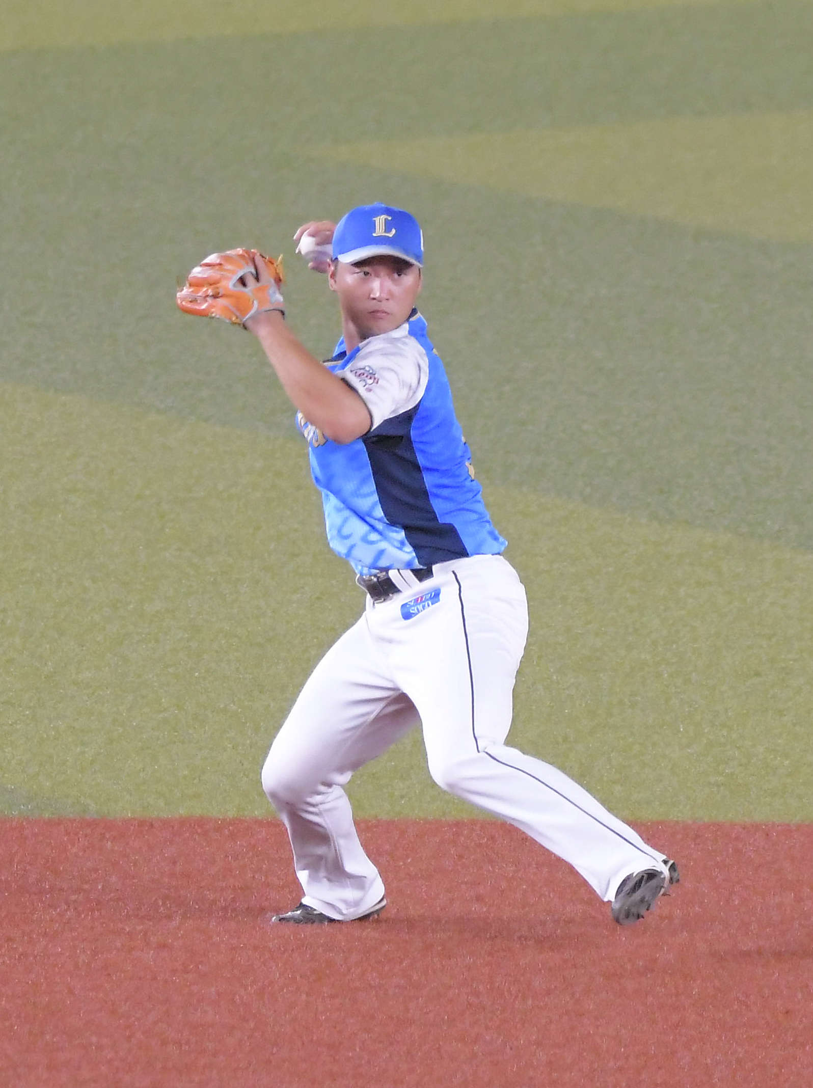 途中守備交代にて遊撃手として出場する永江恭平選手